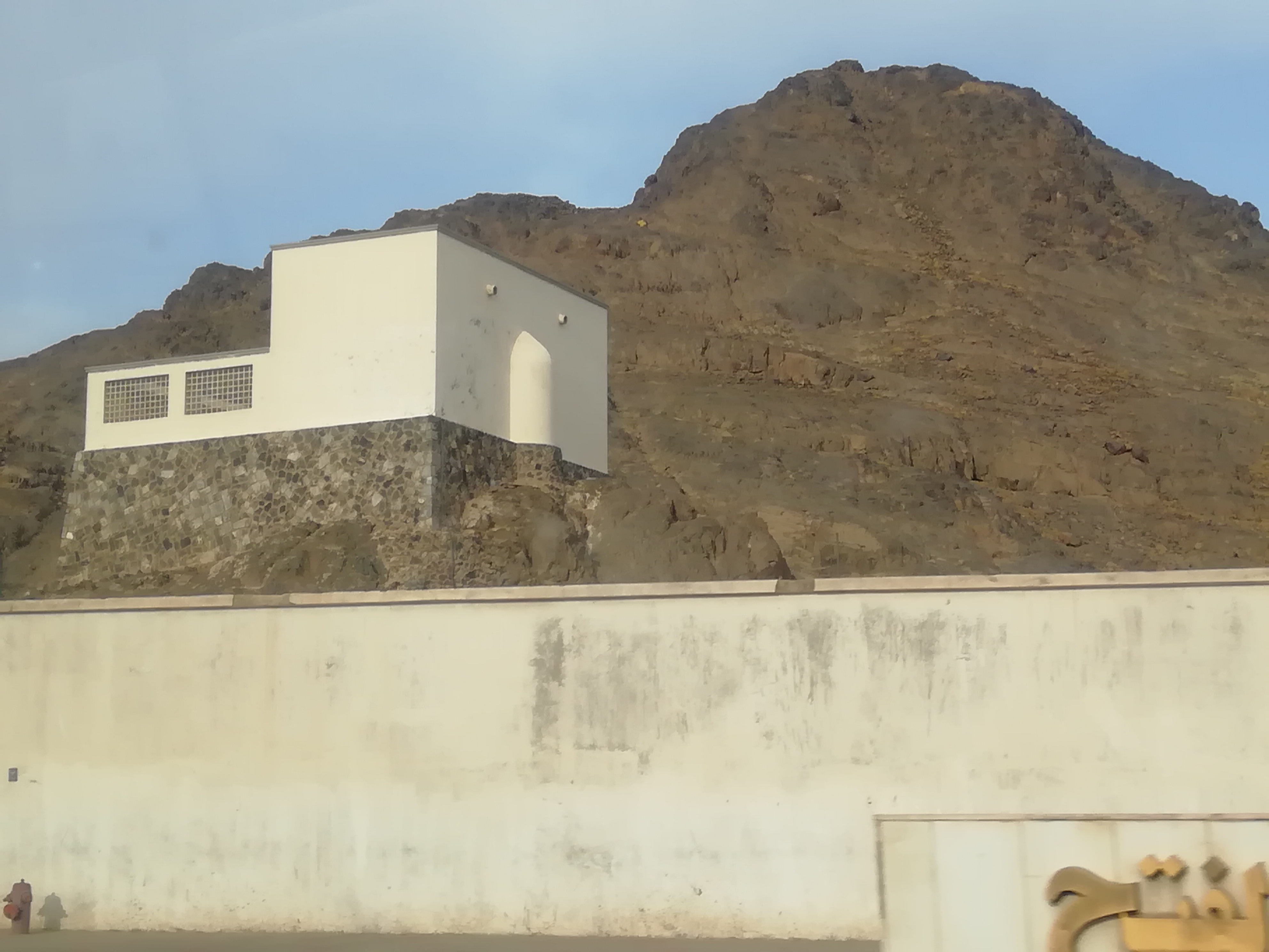 al-Madinah al-Munawarah Salaa mountain Seven mosques area al-Fatah mosque